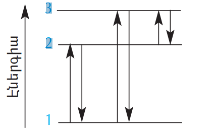 Էլեկտրոնային անցում